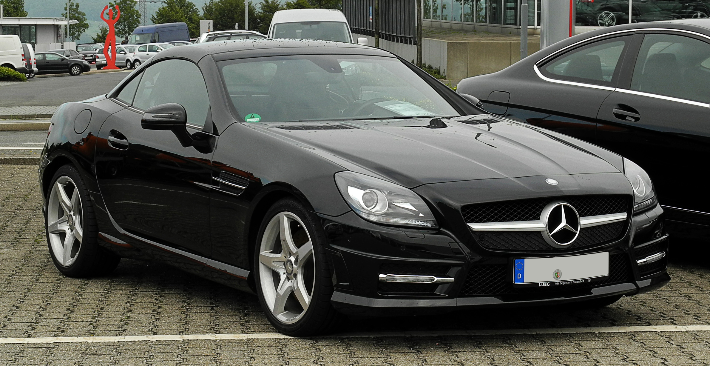 Mercedes-Benz SLK 200 BlueEFFICIENCY Sport-Paket AMG (R 172)